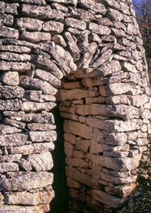 Arc clavé en moellons de l'entrée d'une cabane en pierre sèche à Bonnieux (Vaucluse). Photo Dominique Repérant.